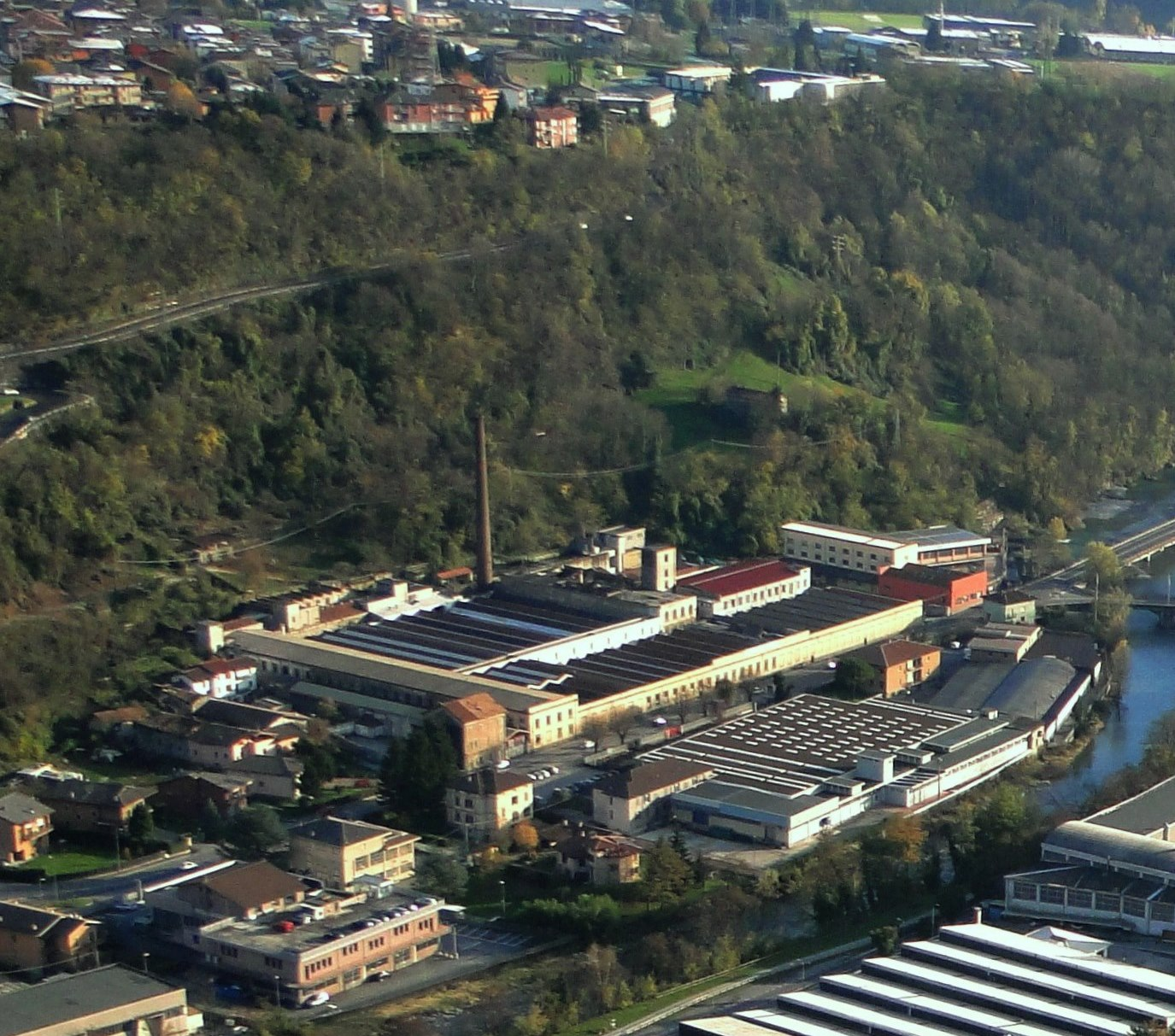 Zona industriale loc. Serio, Casnigo (BG)